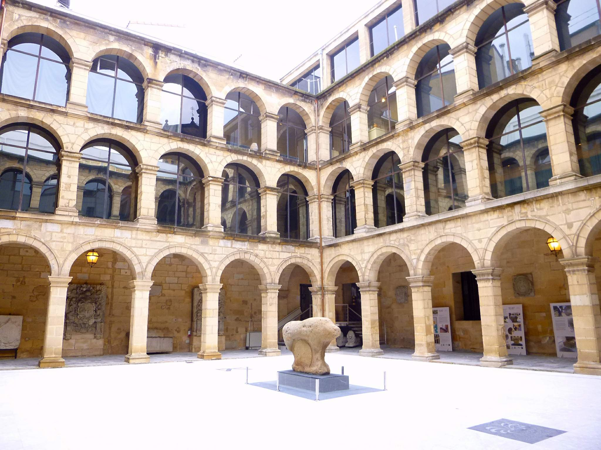 Bilbao - Museo Arqueológico, Etnográfico e Histórico Vasco (Claustro de los Santos Juanes)